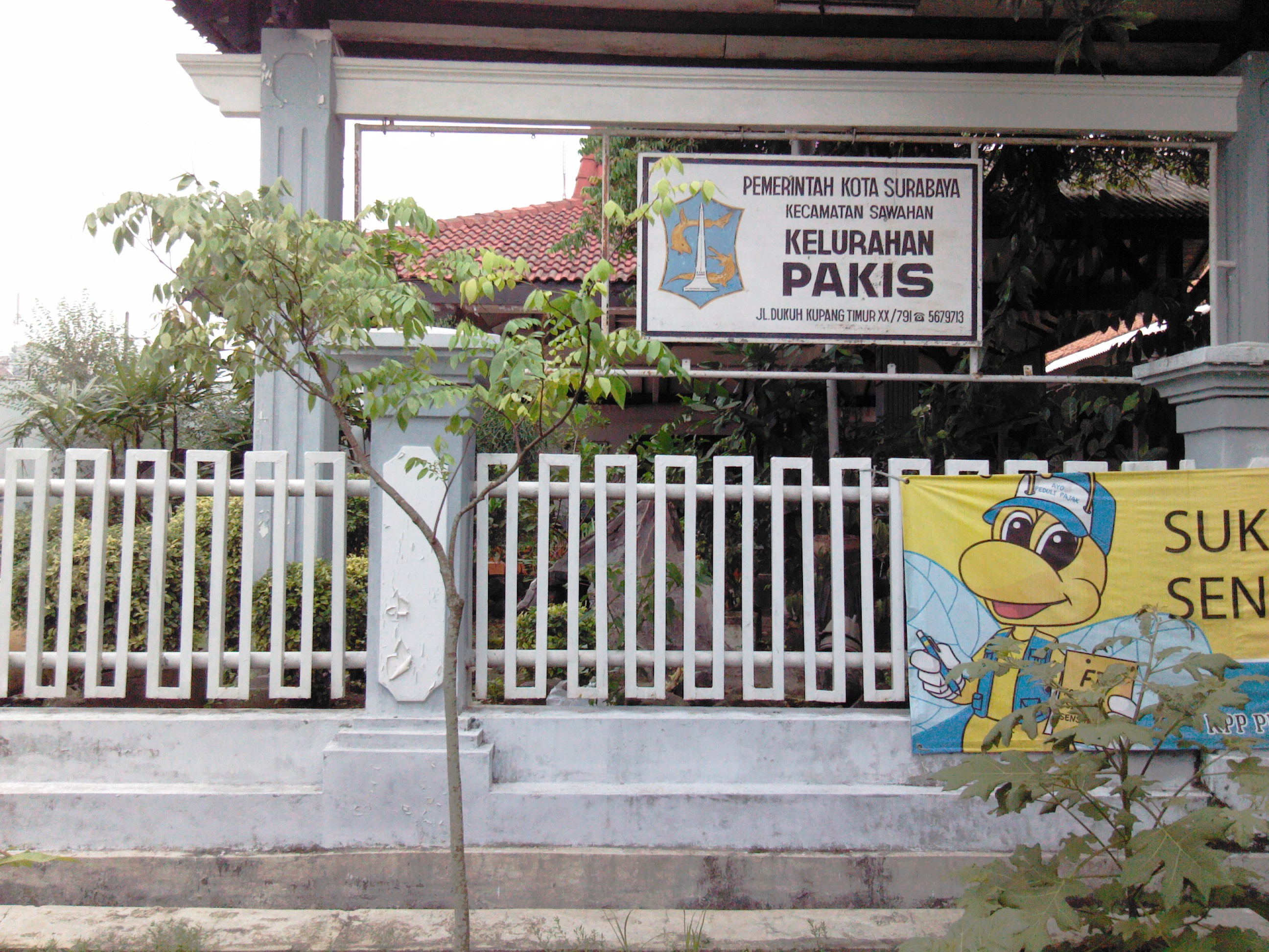 Kantor Kelurahan Pakis